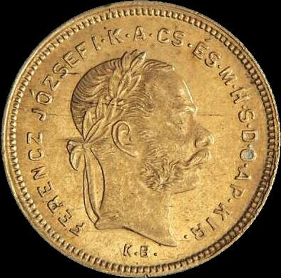 1 dukát Hungary 1881 obverse